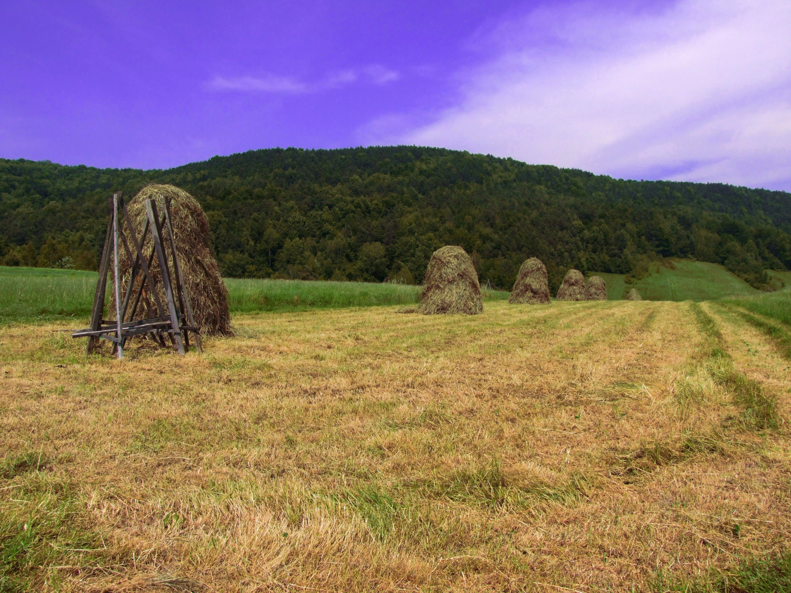 Iwkowa